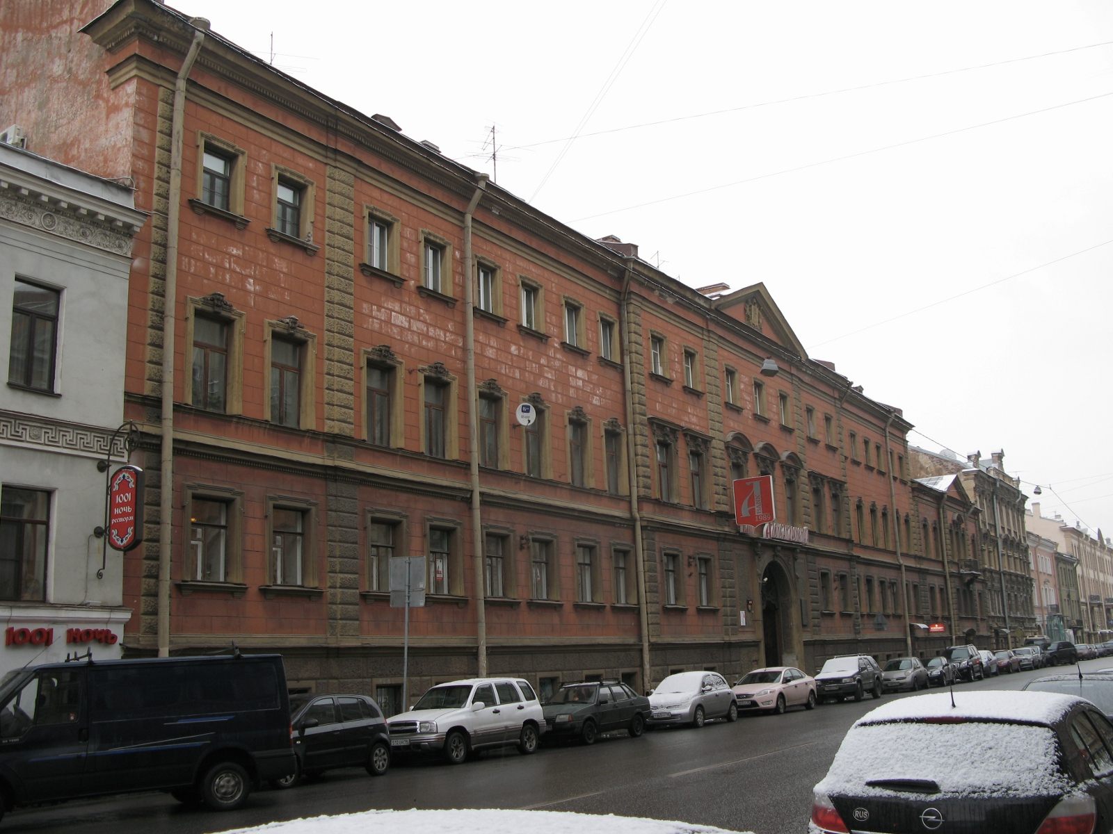 Шталмейстерский корпус Ново-Михайловского дворца, Санкт-Петербург, Миллионная ул., 19